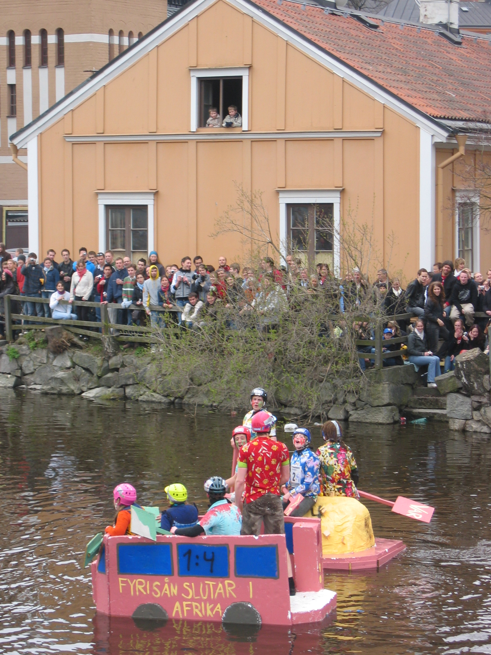 Valborg in Uppsala